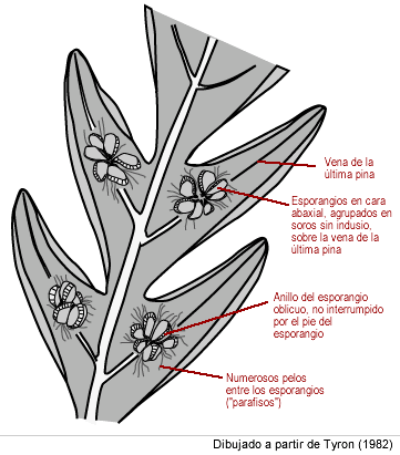 Detalle de cara abaxial de una fronde fértil de Lophosoria quadripinnata. Dibujado a partir de Tyron (1982).